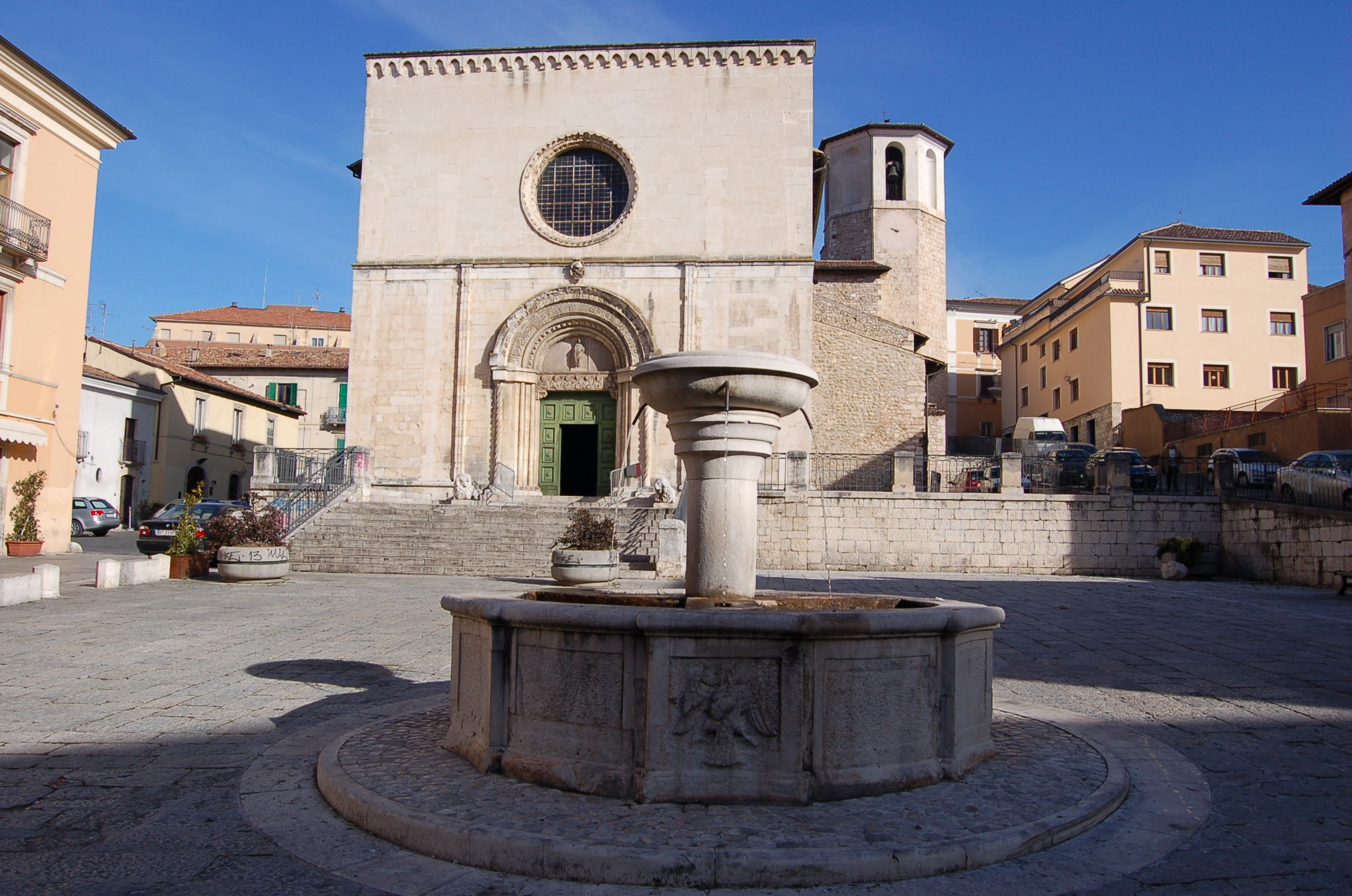 San Pietro a Coppito - L'Aquila, Italia